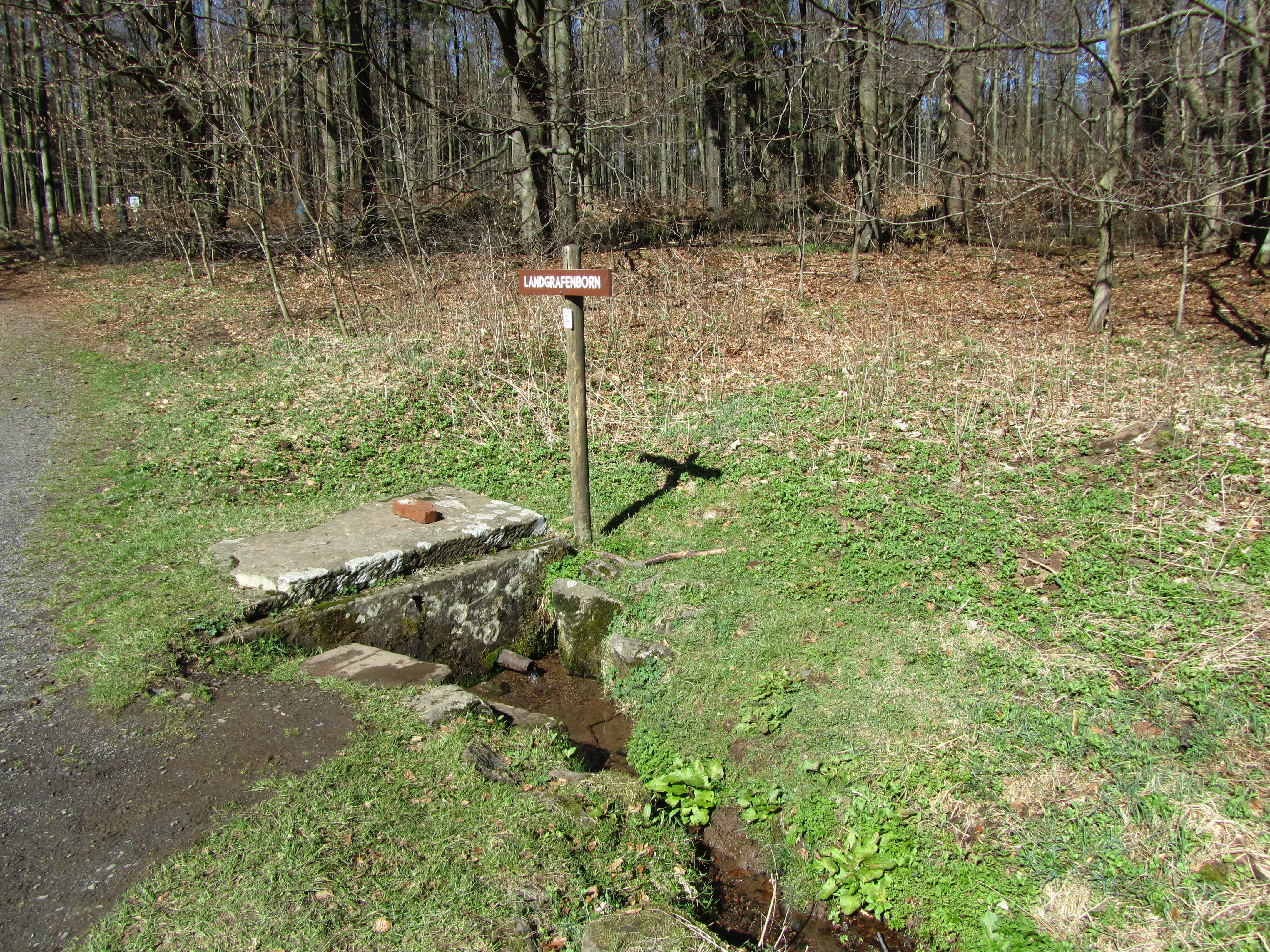 Der Landgrafenborn im Vogelsberg